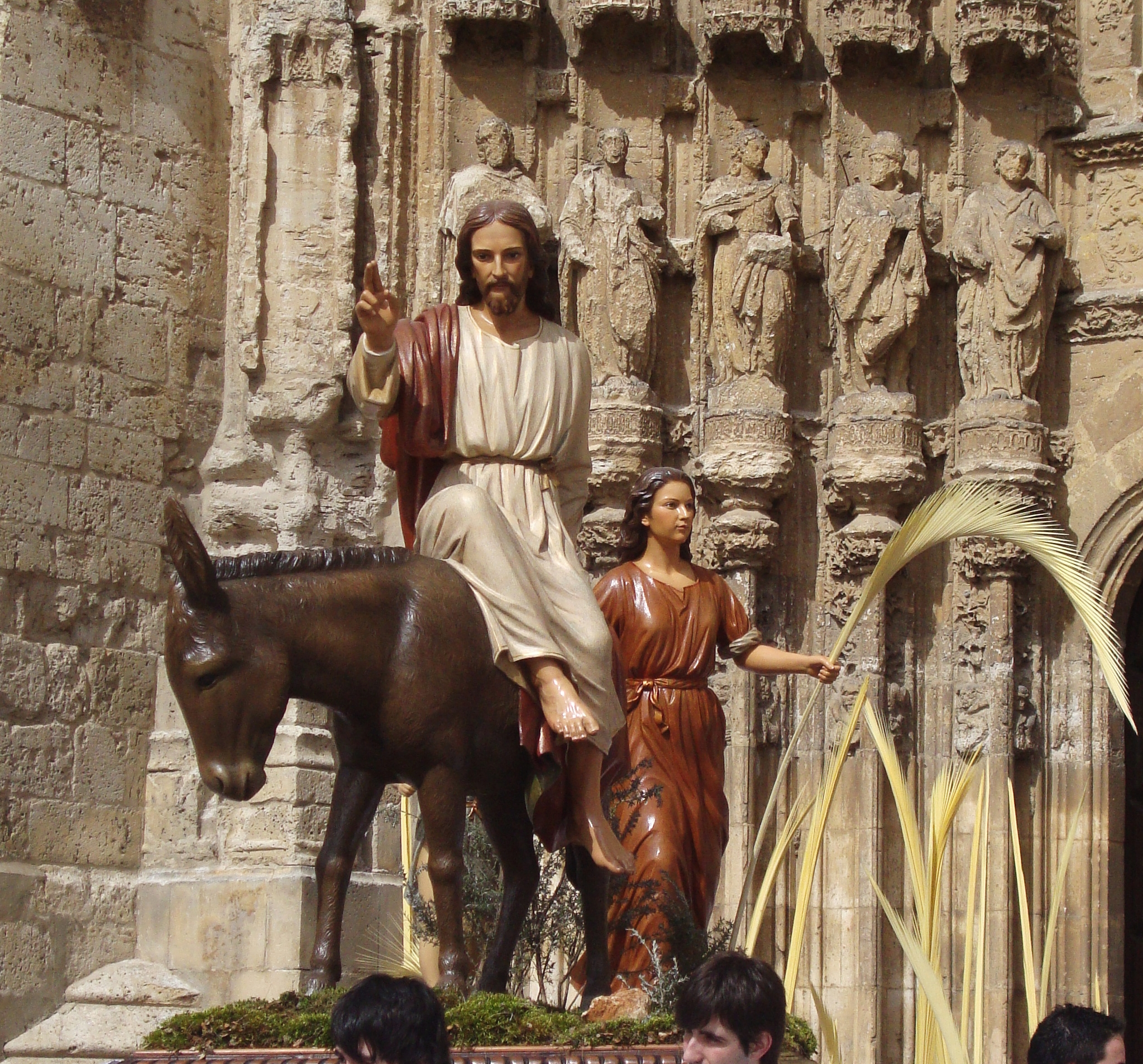 Procession de "La Entrada de Jesús en Jerusalén" le Dimanche de Rameaux dans la ville espagnole de Palencia.